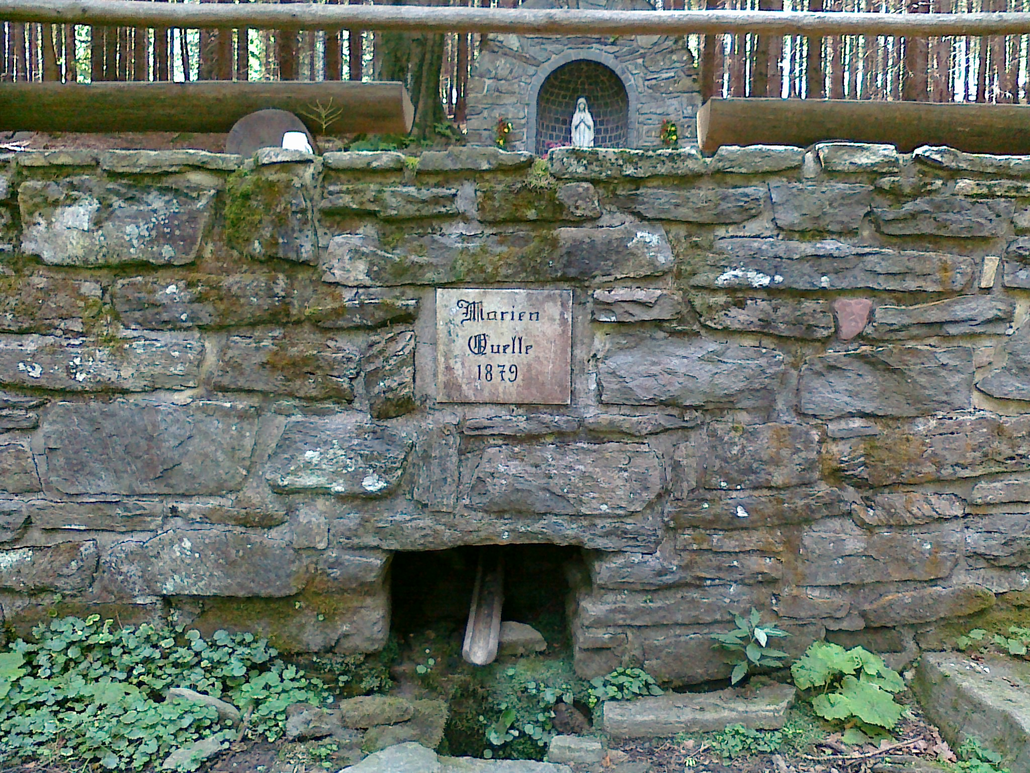 Tablica Marien Quelle 1879 nad źródłem Mariin Pramen